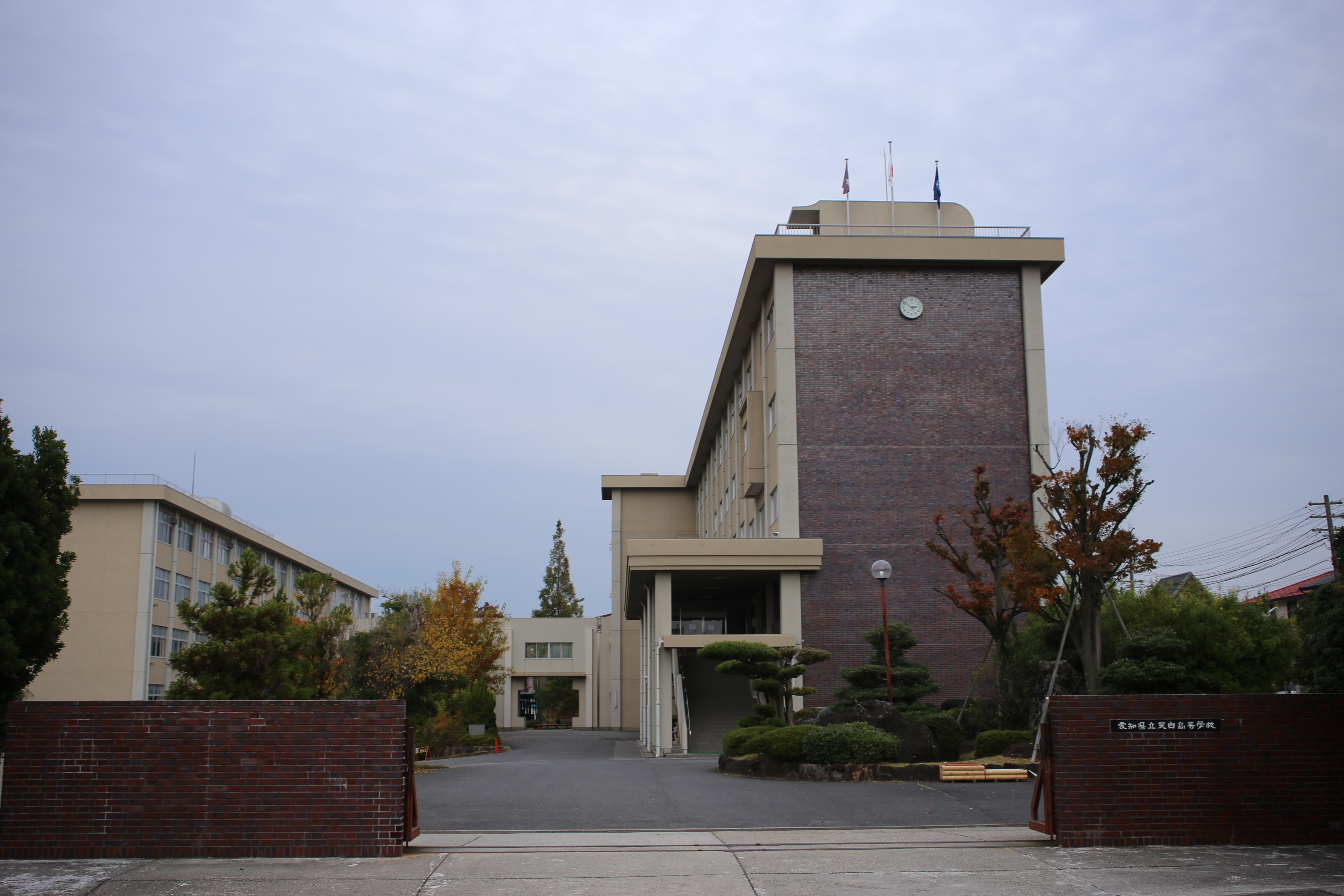 名古屋市天白区植田東一丁目の愛知県立天白高等学校を西側公道より撮影